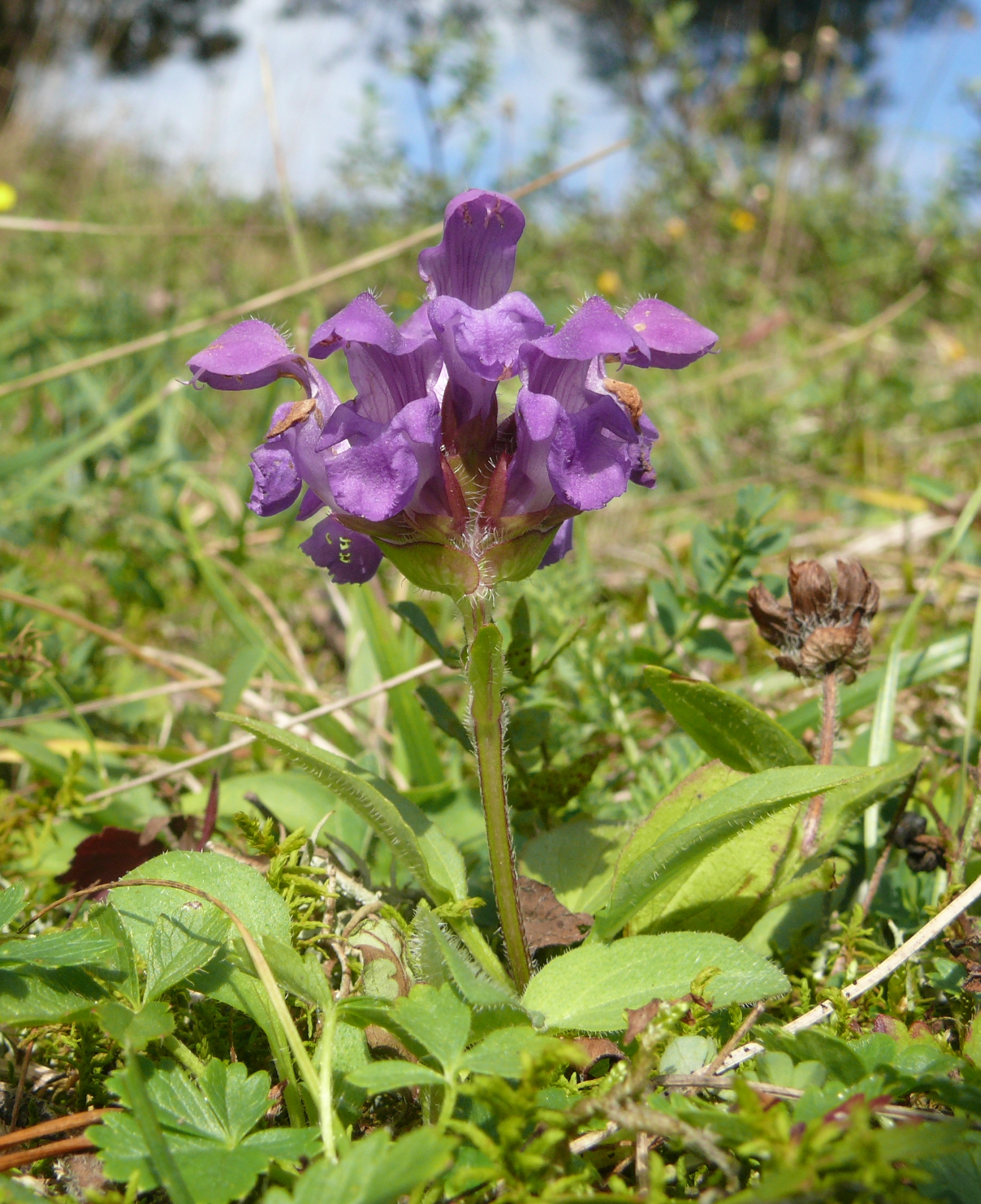 Prunella grandiflora, Schwäbisch-Fränkische Waldberge, Germany